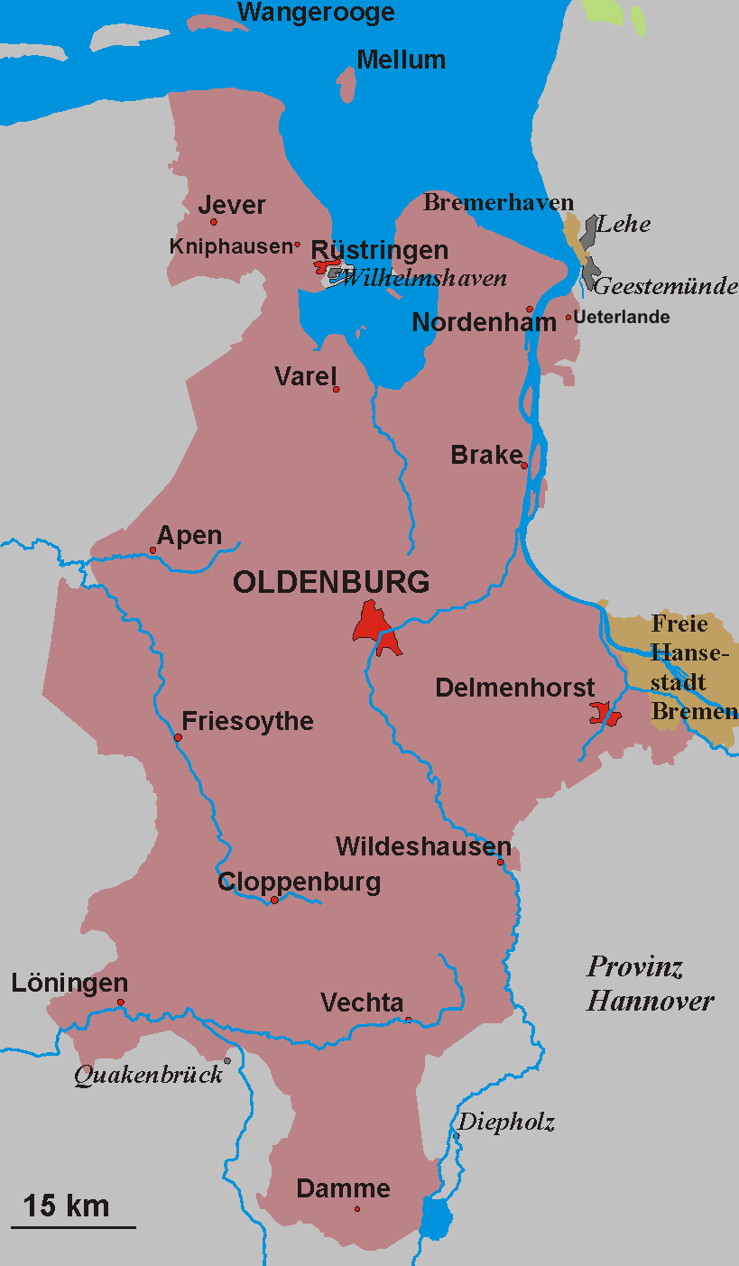 Karte des Oldenburgs 1866-1937